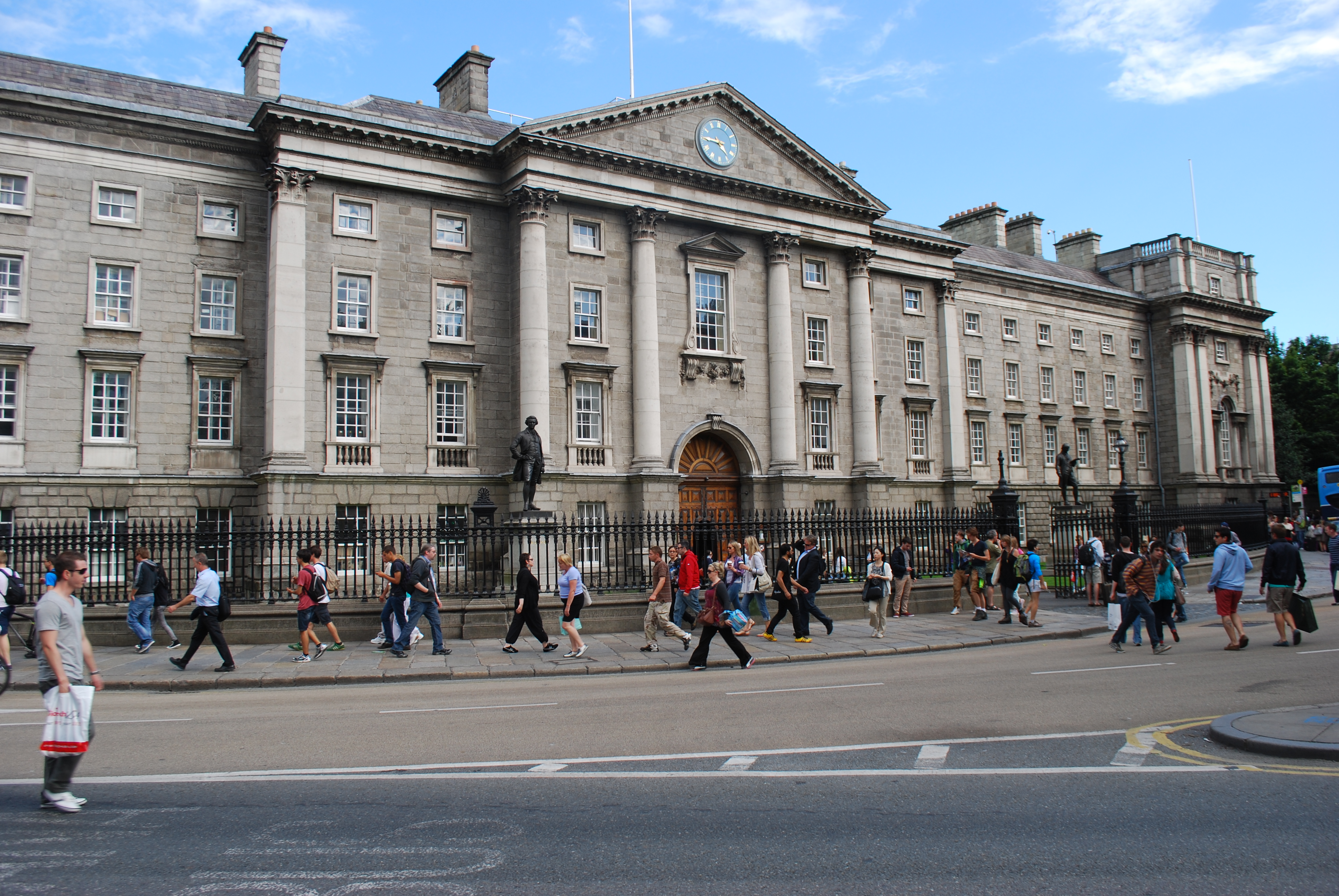 Vue de Trinity College à Dublin.